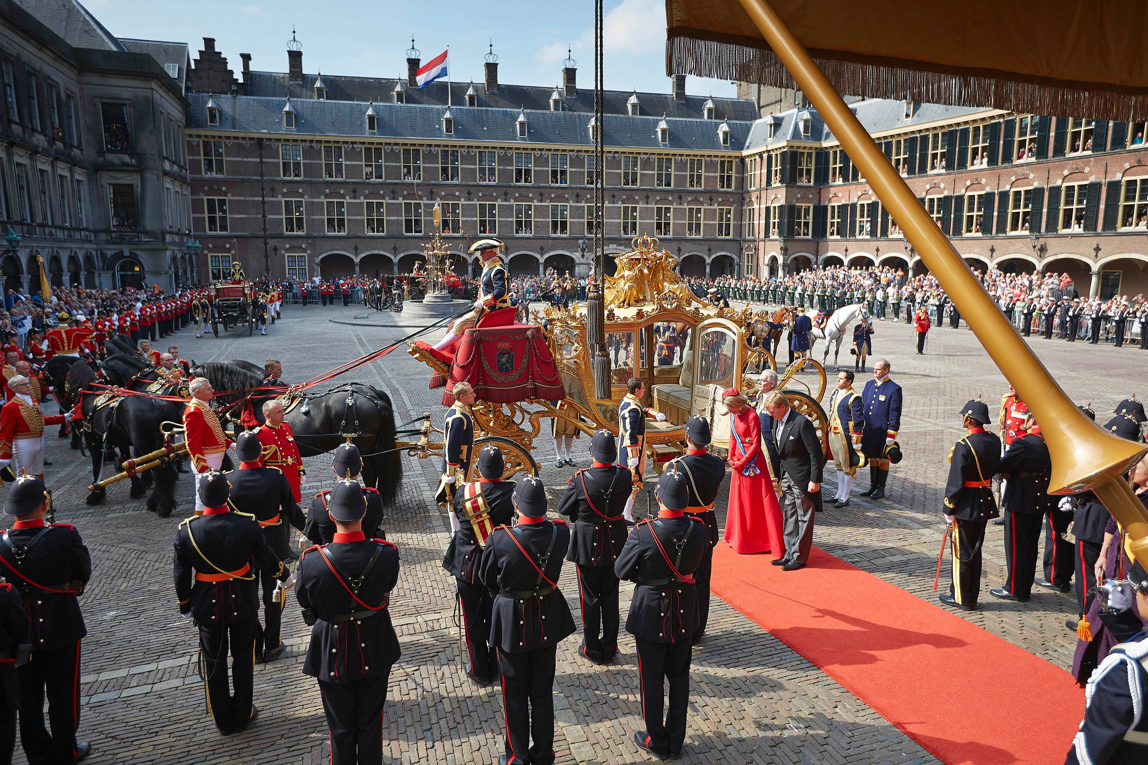 Koning en Koningin nijgen naar het vaandel op Prinsjesdag 2014